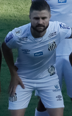 (Santos - SP, 16/11/2019) Partida de futebol Santos e São Paulo na Vila Belmiro. Foto: Isac Nóbrega/PR